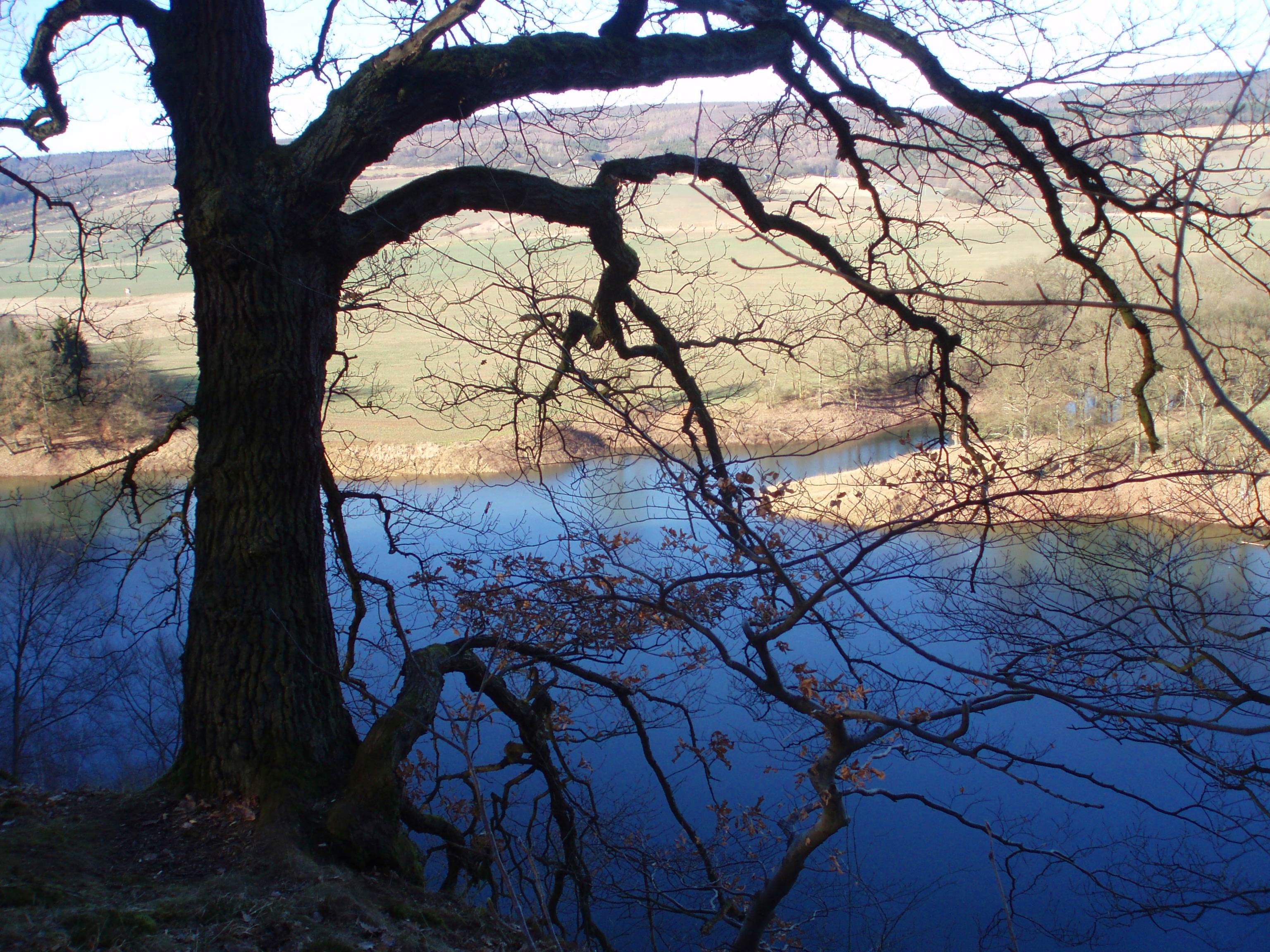 Bauerngraben im gefüllten Zustand, mit zufließendem Glasebach; Naturschutzgebiet „Gipskarstlandschaft Questenberg“